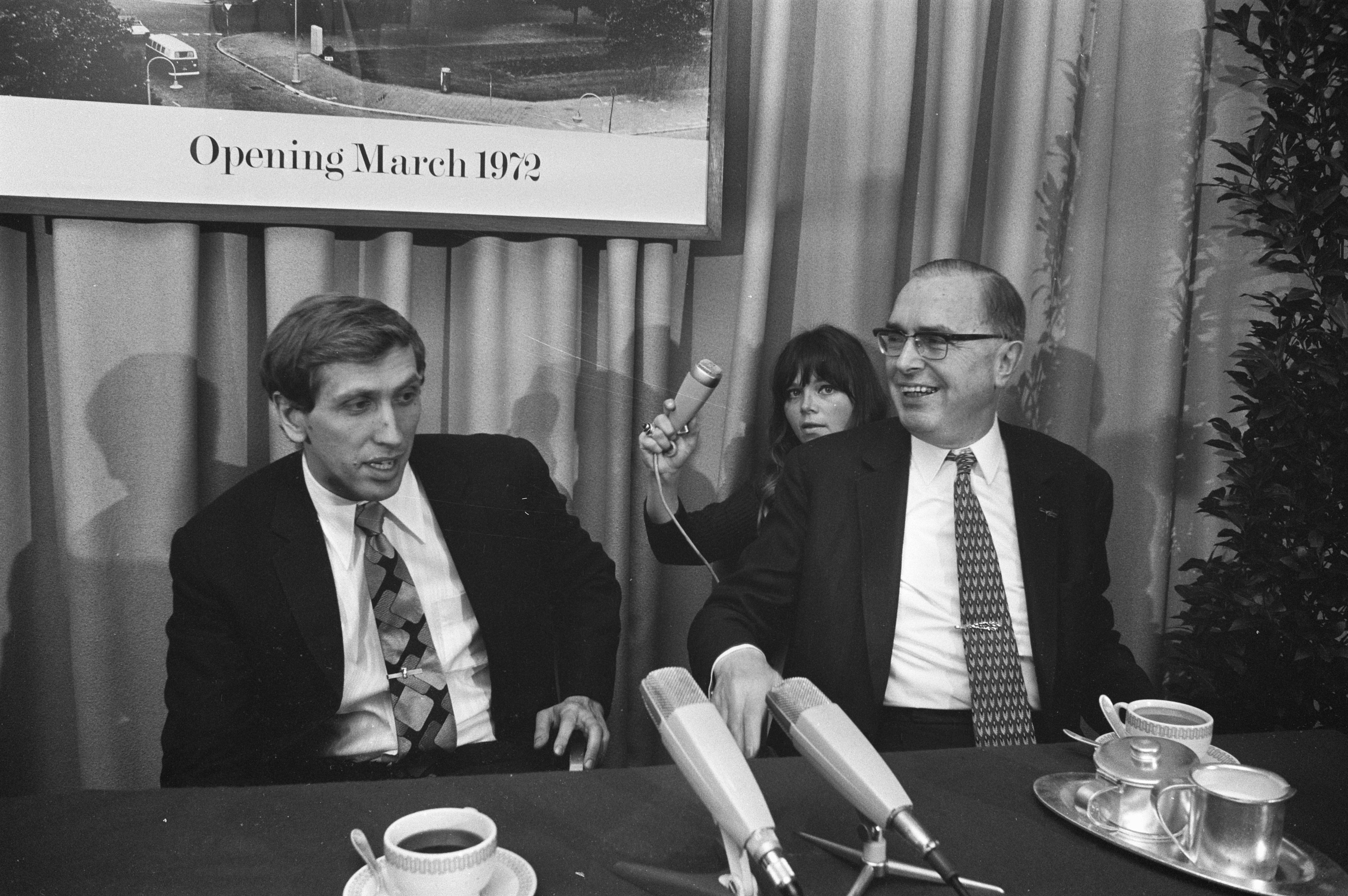 Collectie / Archief : Fotocollectie Anefo Reportage / Serie : [ onbekend ] Beschrijving : Bobby Fischer in Hilton Hotel te Amsterdam voor besprekingen met FIDE-voorzitter Max Euwe (rechts) over de tweekamp om het wereldkampioenschap met Boris Spassky Datum : 31 januari 1972 Locatie : Amsterdam, Noord-Holland Trefwoorden : schaken, sport Persoonsnaam : Euwe Max, Fischer Bobby, Hilton Fotograaf : Verhoeff, Bert / Anefo Auteursrechthebbende : Nationaal Archief Materiaalsoort : Negatief (zwart/wit) Nummer archiefinventaris : bekijk toegang 2.24.01.05 Bestanddeelnummer : 925-3515